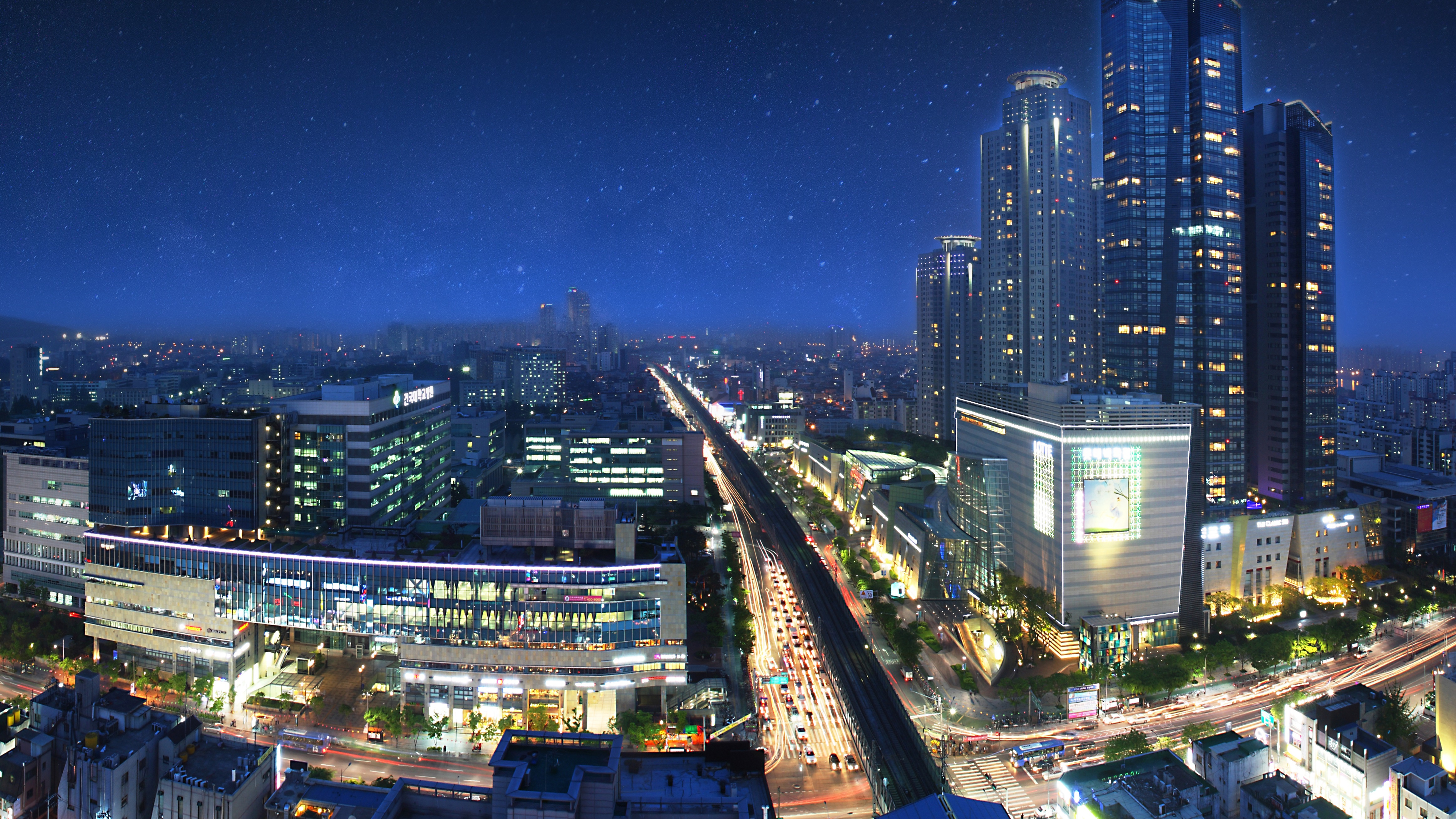 건대 스타시티몰과 더 클래식 500 야경